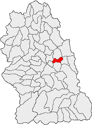 Categorie:Hărţi ale judeţului Hunedoara